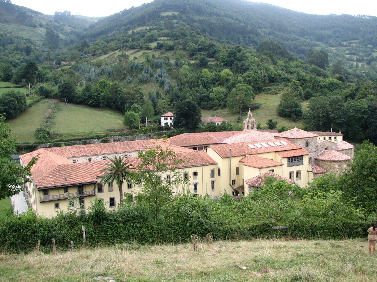 Monasterio de Santa María de Valdediós